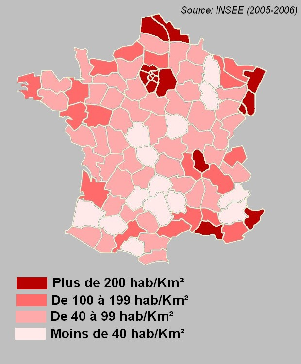 Densité de la France par département